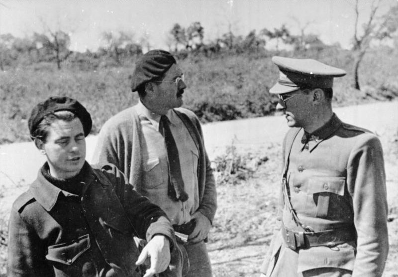 ADN-ZB/Archiv Nationalrevolutionärer Krieg des spanischen Volkes vom 18.7.1936 bis 2.4.1939/ Internationale Brigaden Während des spanischen Freiheitskampfes weilten Joris Ivens, holländischer Filmregisseur (links) und Ernest Hemingway, nordamerikanischer Schriftsteller (Mitte) bei den Internationalen Brigaden. Ludwig Renn, Chef des Stabes der XI.Internationalen Brigaden, Kommandeur des Thälmann-Bataillons (rechts).